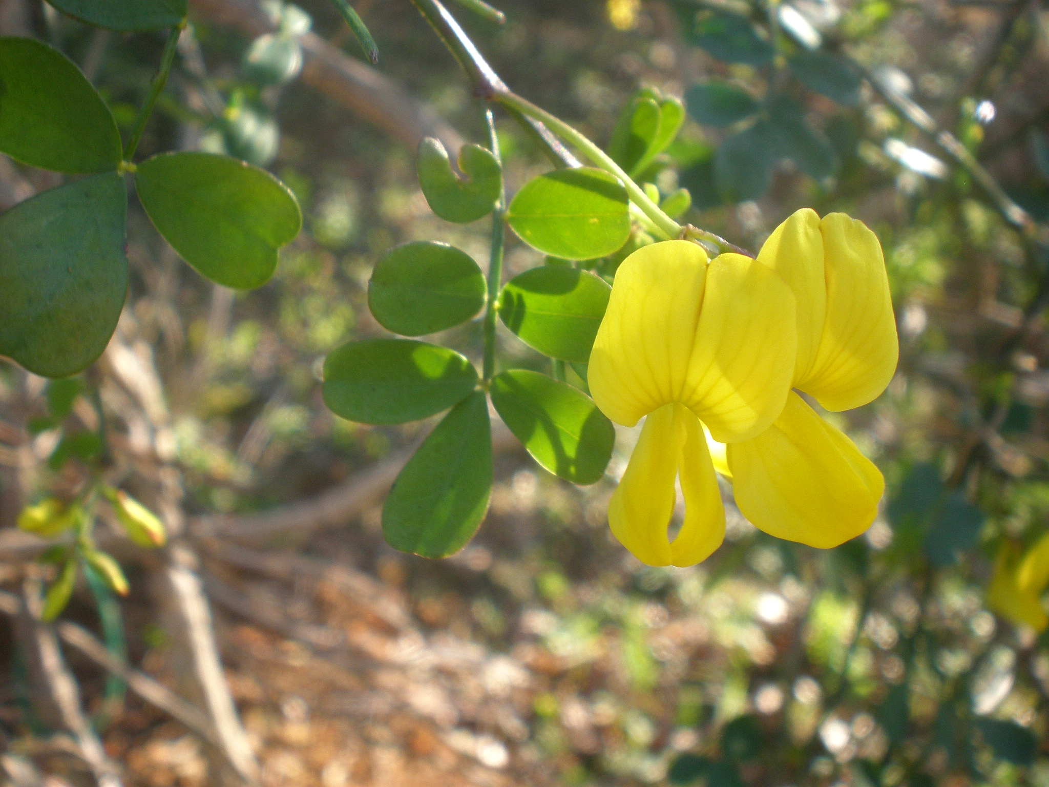 Jardín Botánico de Barcelona.